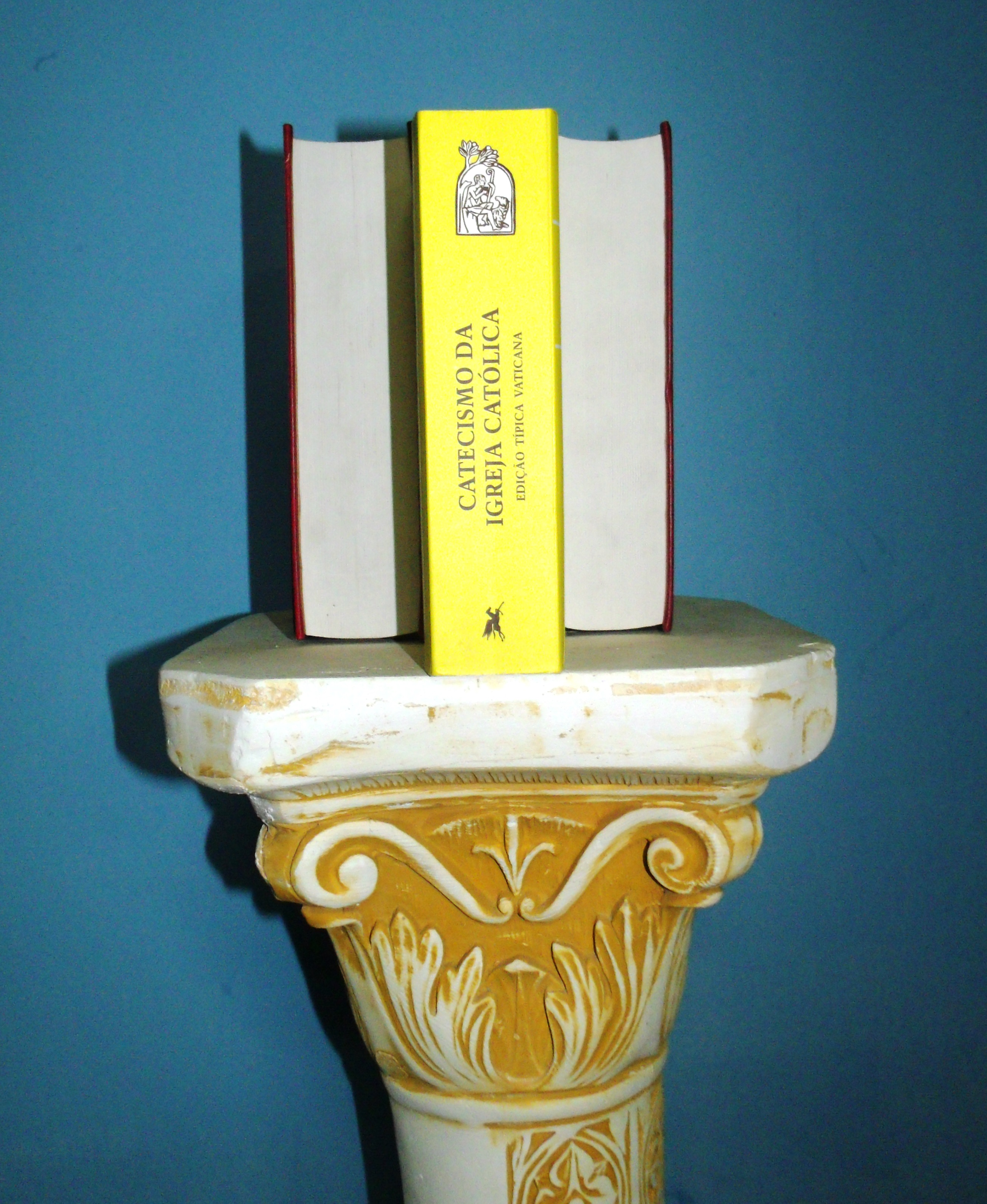 Uma edição brasileira do Catecismo da Igreja Católica pelas Edições Loyola.